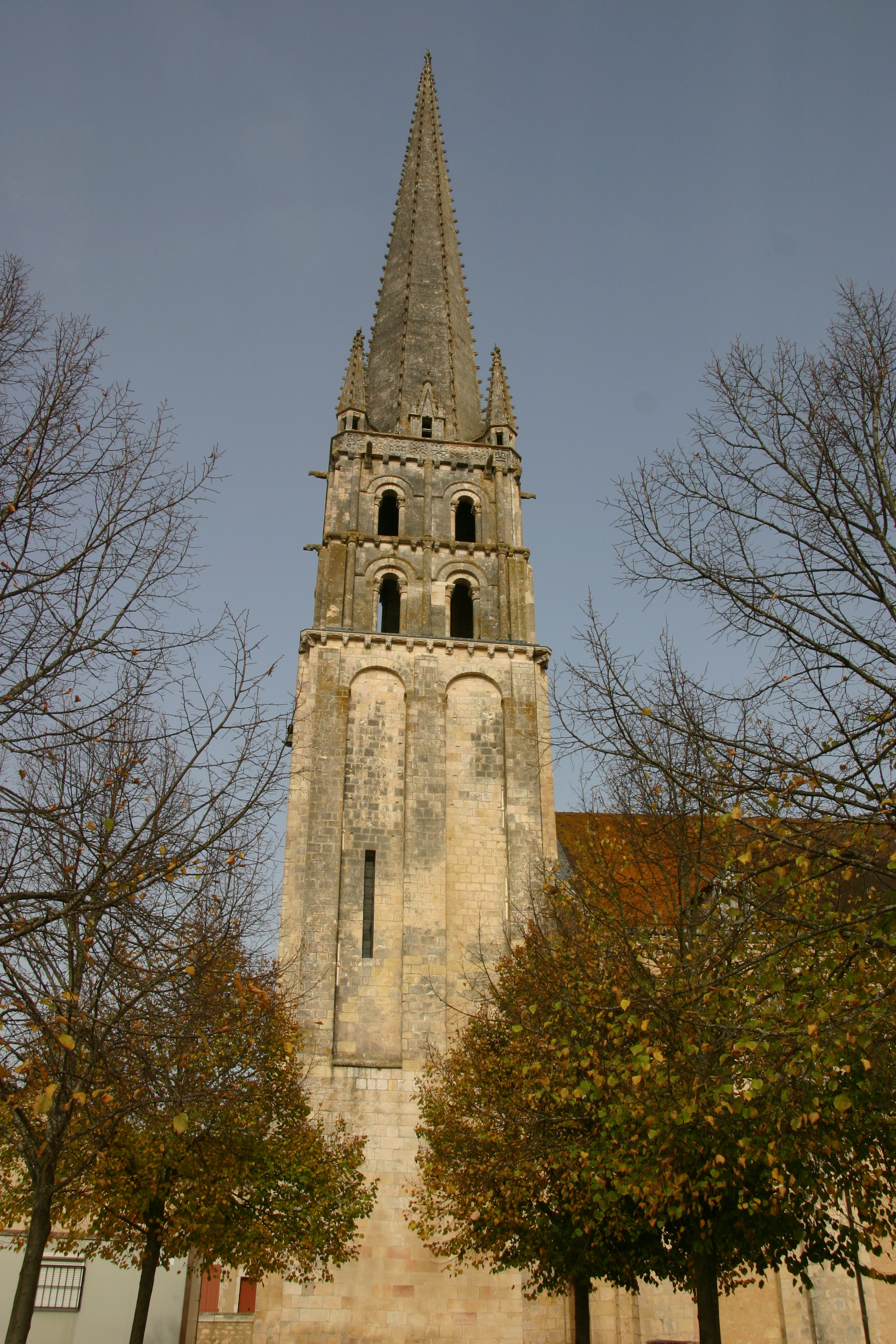 Abtei-Kirche Saint-Savin-sur-Gartempe